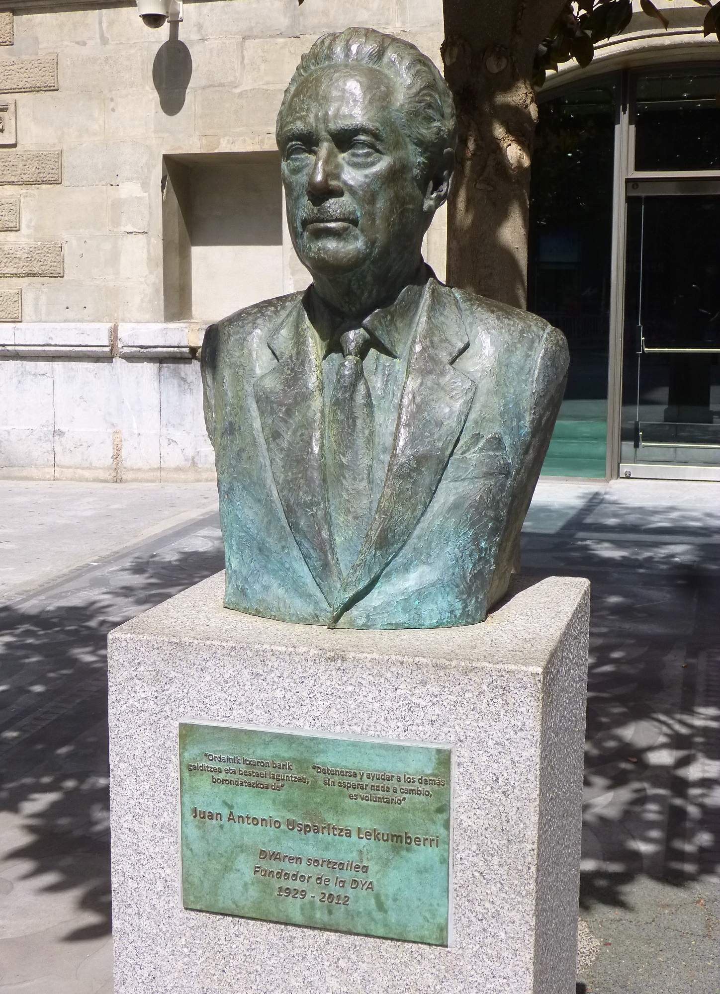 Bilbao - Monumento a Juan Antonio Usparritza, fundador de la DYA